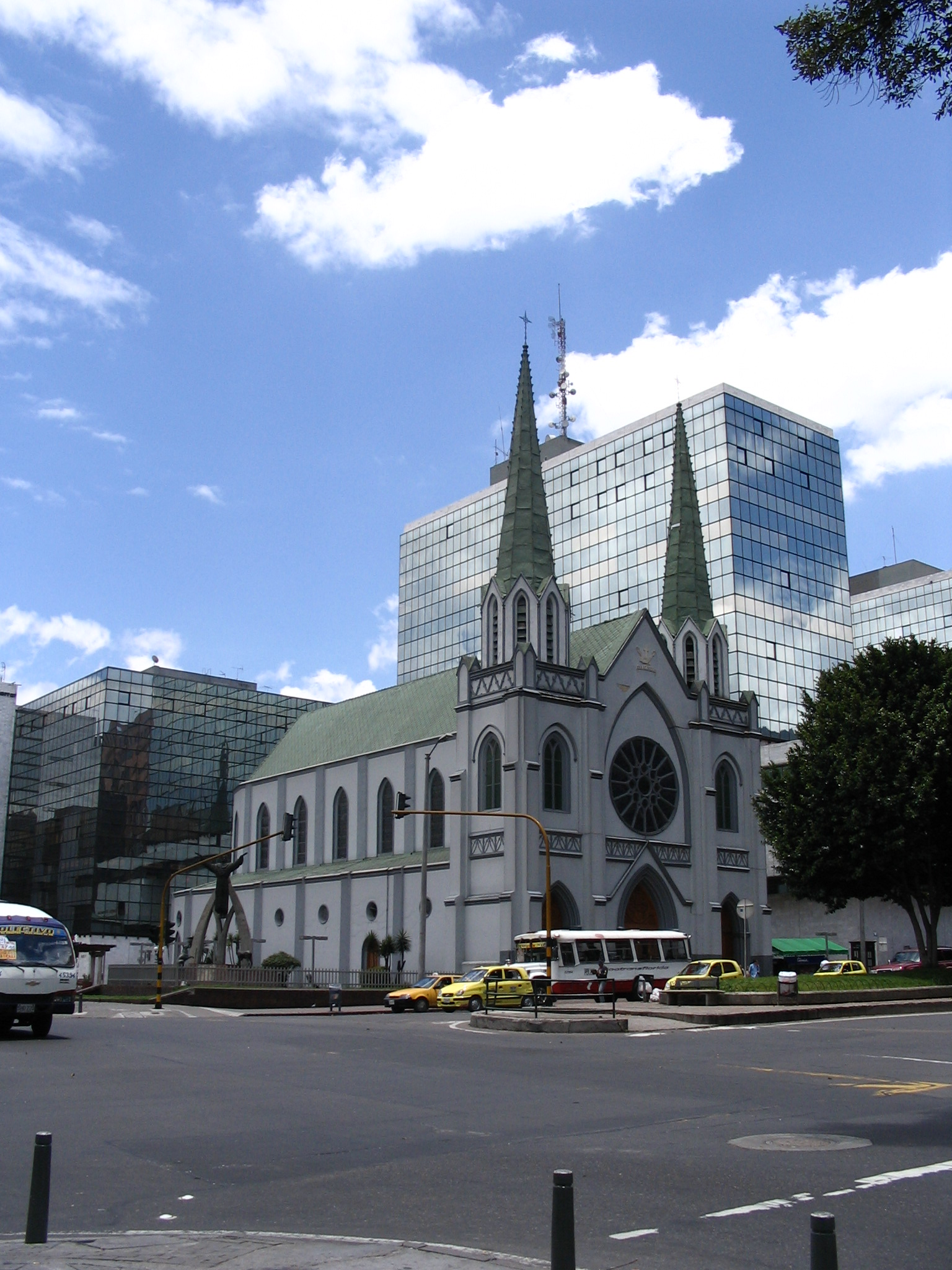 Centro Granahorrar e Iglesia del Barrio La Porciúncula en Chapinero. Fotografía Tomada por Tequendamia para la Wikipedia.